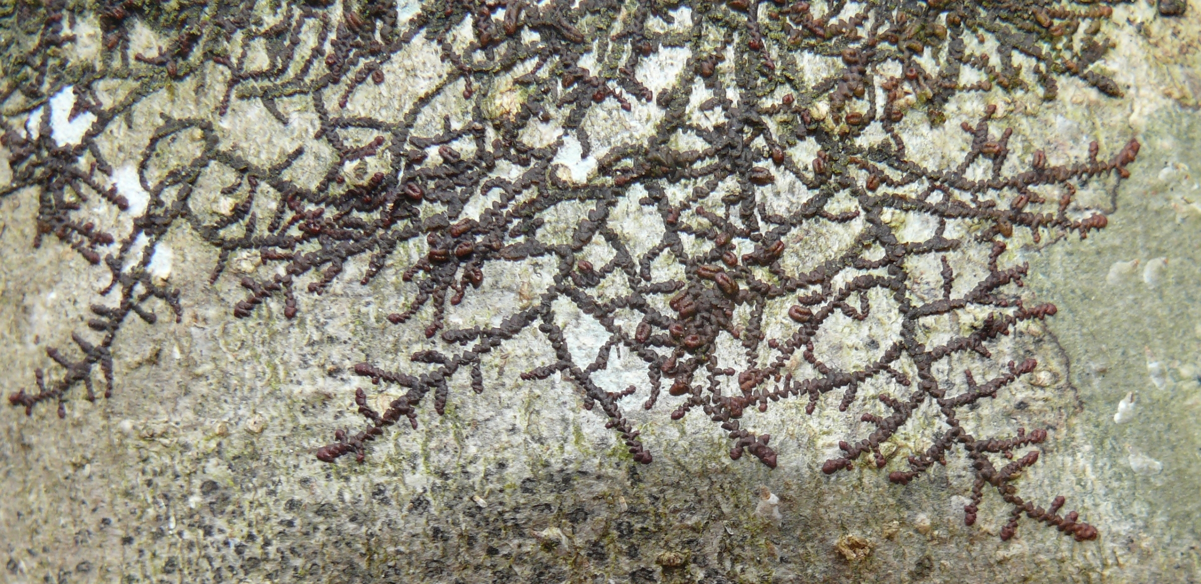 Frullania fragilifolia, Schwäbisch-Fränkische Waldberge, Germany